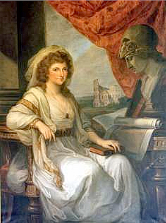 Anna Amalia von Preußen nach dem Original von Angelika Kaufmann#REDIRECT